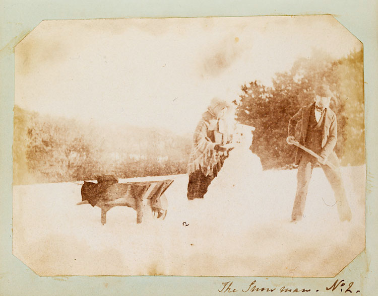 Ffotograffydd/Photographer: Mary Dillwyn (1816-1906) Dyddiad/Date: c.1853 Cyfrwng/Medium: Salt print Cyfeiriad/Reference: mdl00010 Rhif cofnod / Record no.: 3377381 Rhagor o wybodaeth am Ffotograffiaeth Gynnar Abertawe yn Llyfrgell Genedlaethol Cymru More information about Early Swansea Photography at the National Library of Wales